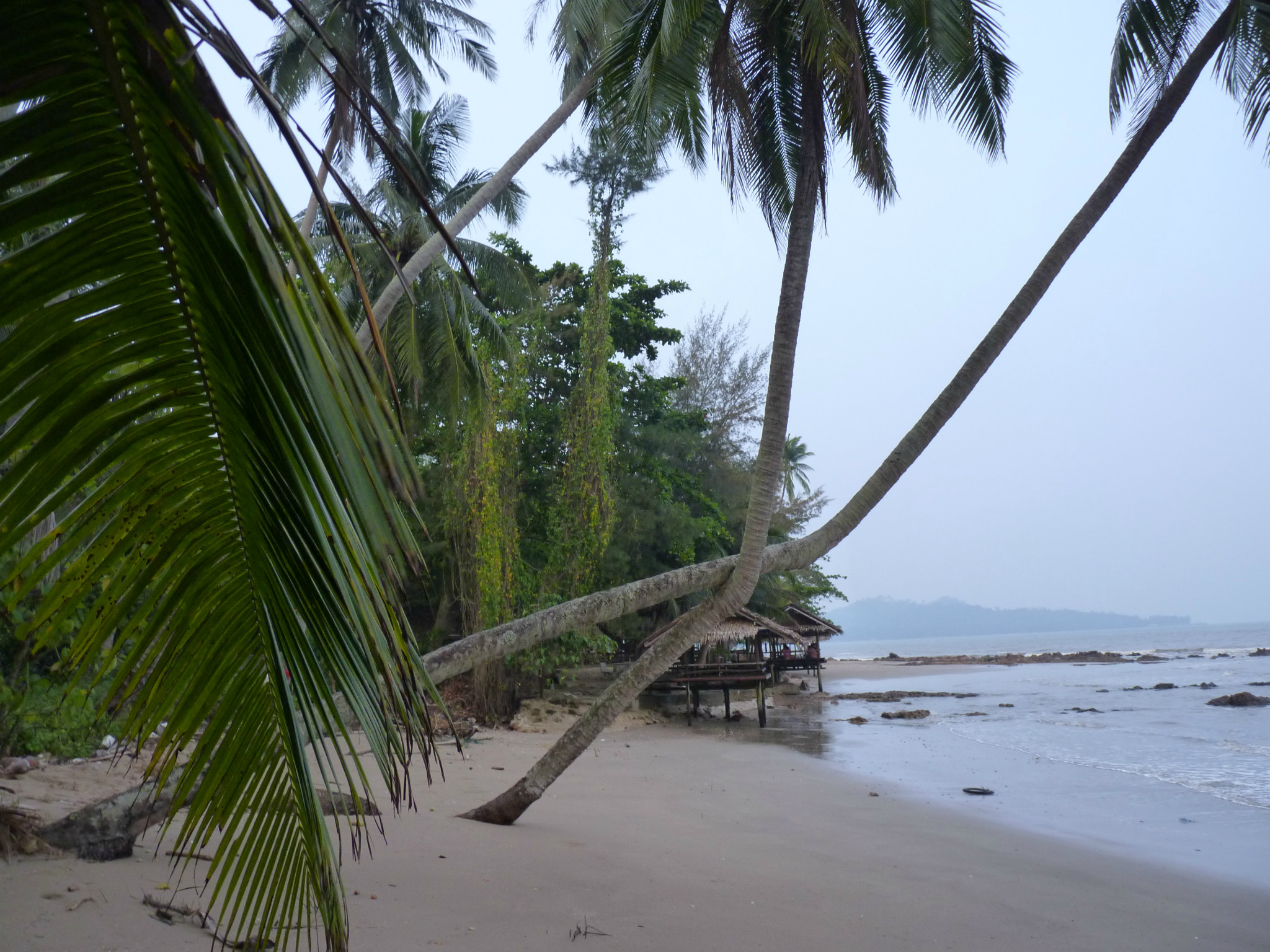 Bang Nam Chuet beach